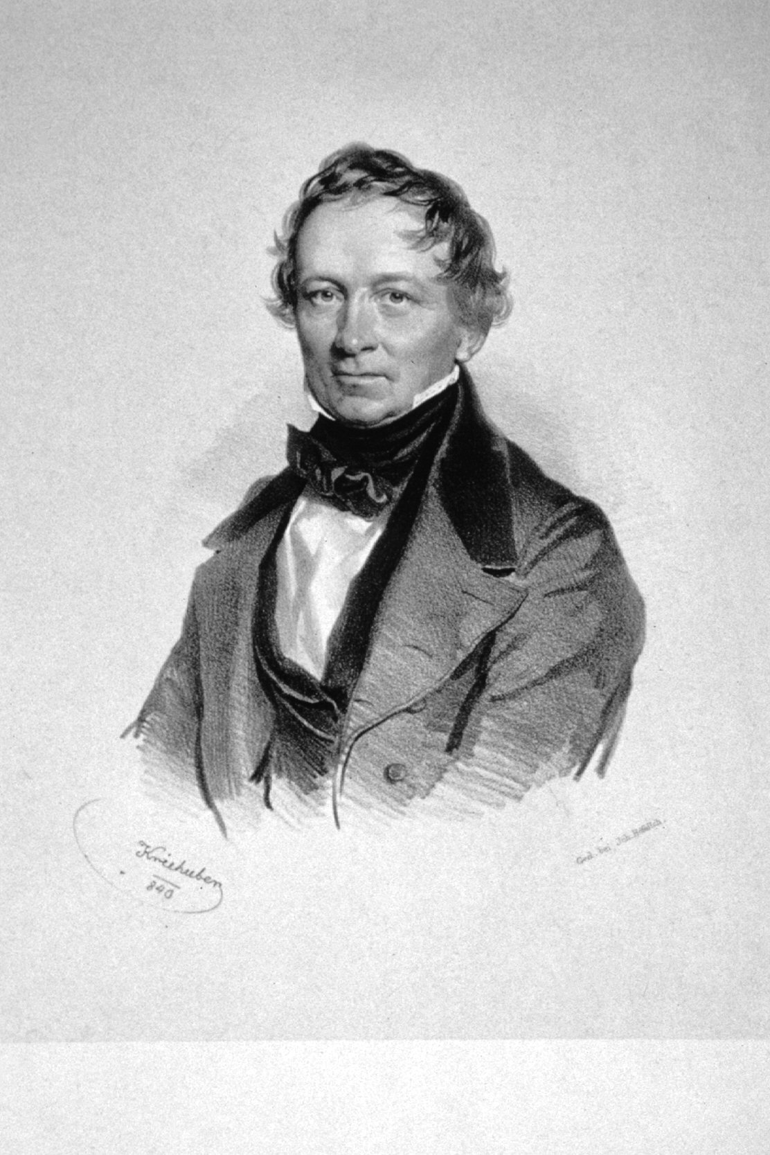 Franz Pfeifer (Germanist), Lithographie von Josef Kriehuber, 1840